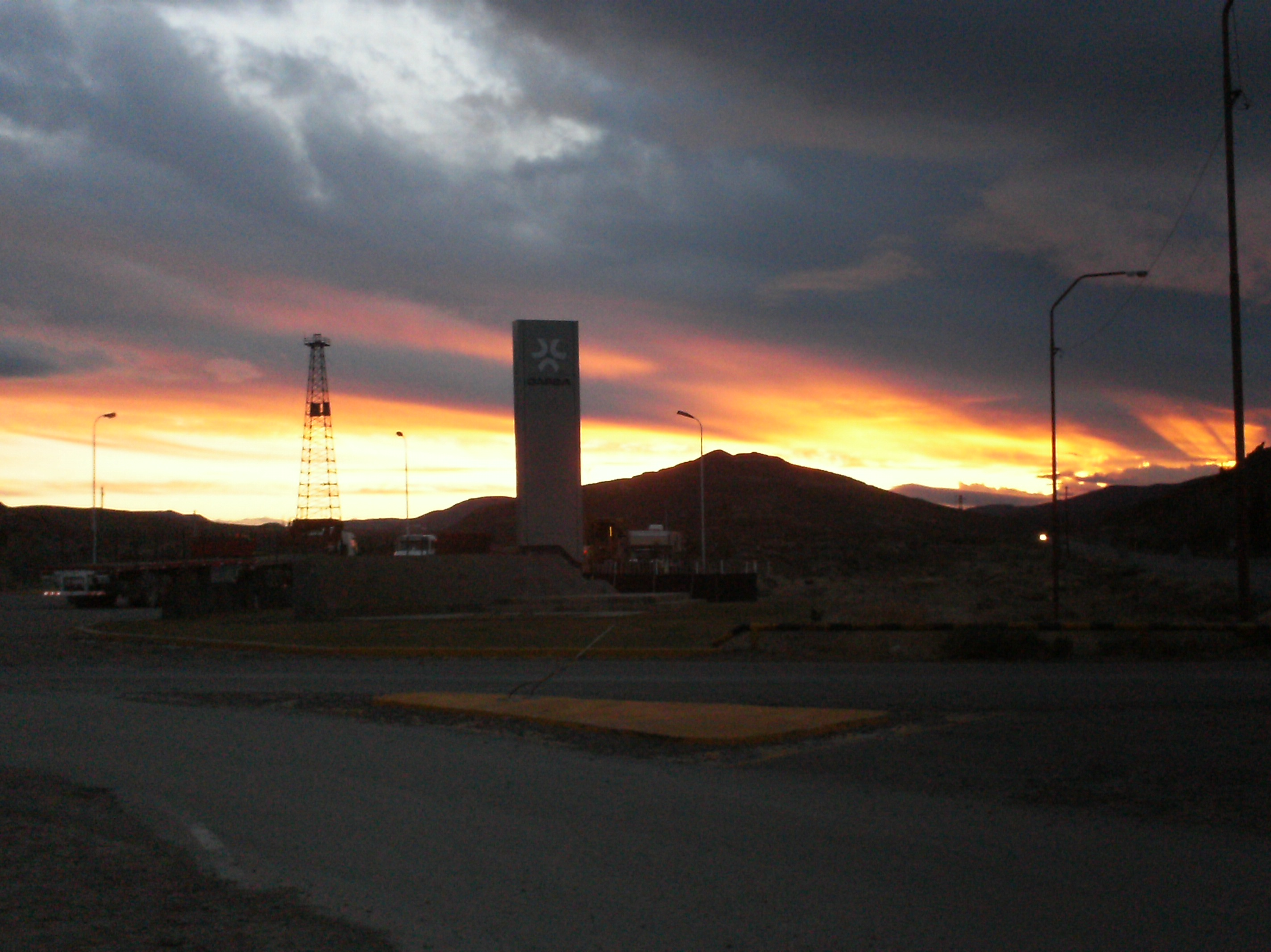 la empresa capsa recibe un monumento por su labor en este sector de comdoro